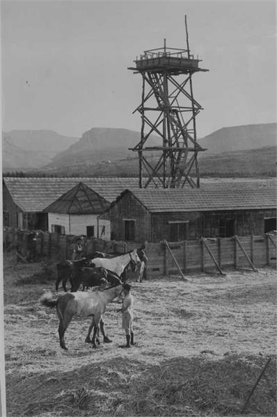 גינוסר - על אדמת פיק"א